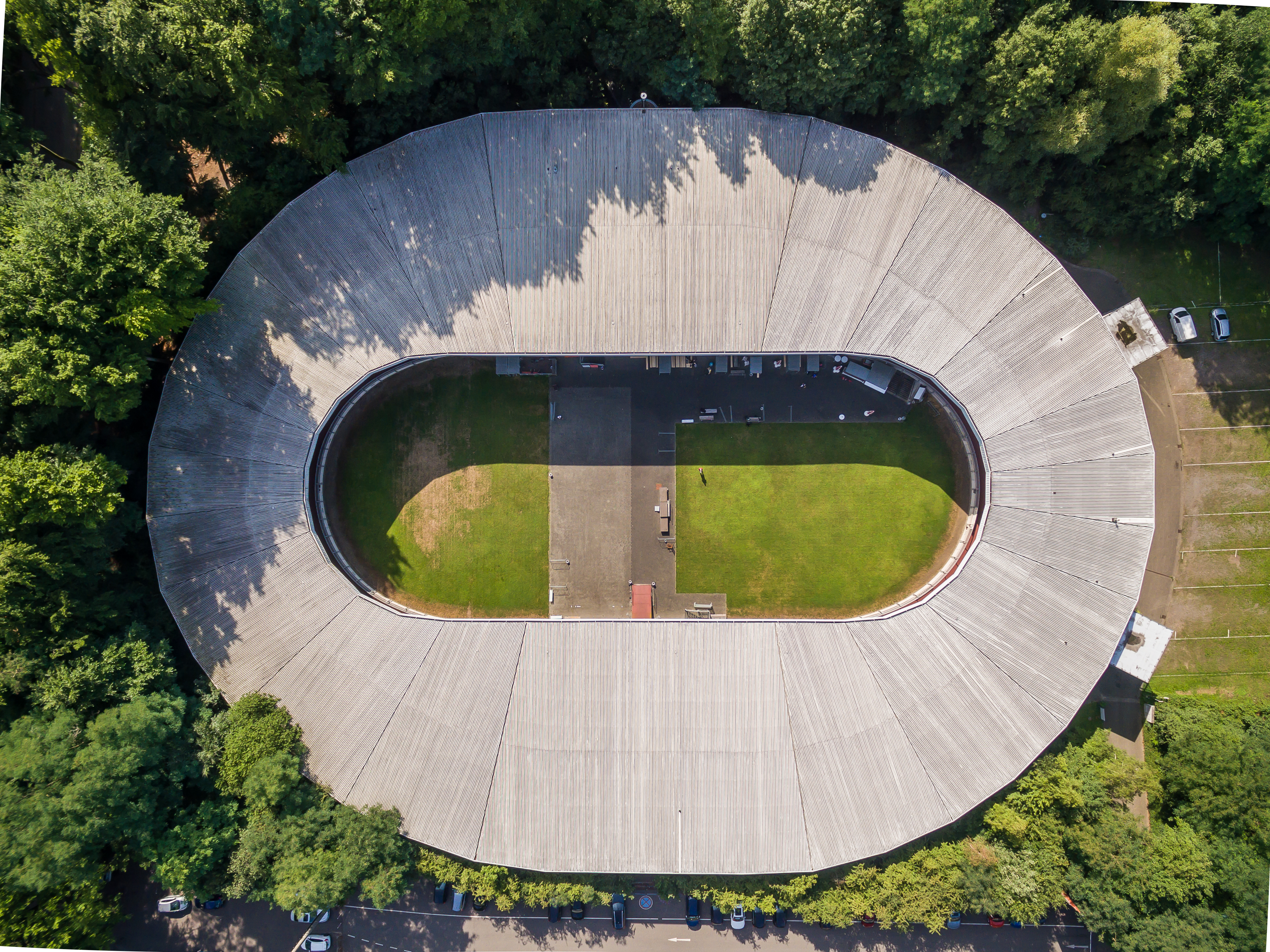 Radstadion Köln im Sportpark Müngersdorf